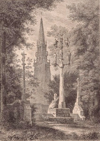 L'enclos paroissial de Pencran en 1865 (dessin de Charles Yriarte paru dans le n° du 29 juillet 1865 de la revue "Le Monde illustré")